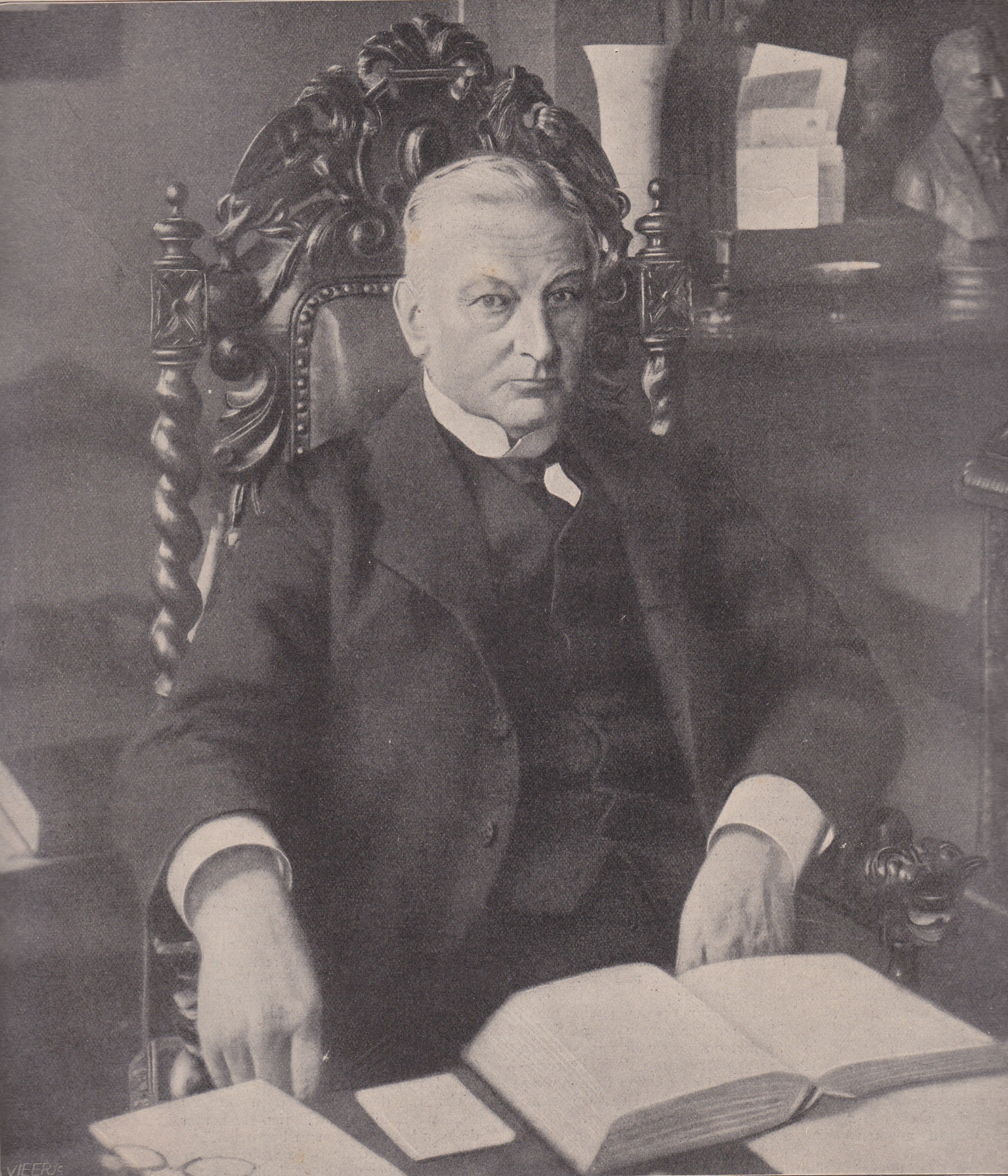 Jhr. Mr. A. F. DE SAVORNIN LOHMAN, Minister van Staat, oud-minister van Binnenlandse Zaken, oud-lid van de Eerste Kamer, lid van de Tweede Kamer des Staten-Generaal, lid van het bestuur van de Carnegie-stichting enz. - (Ter gelegenheid van zijn gouden promotie-jubileum)